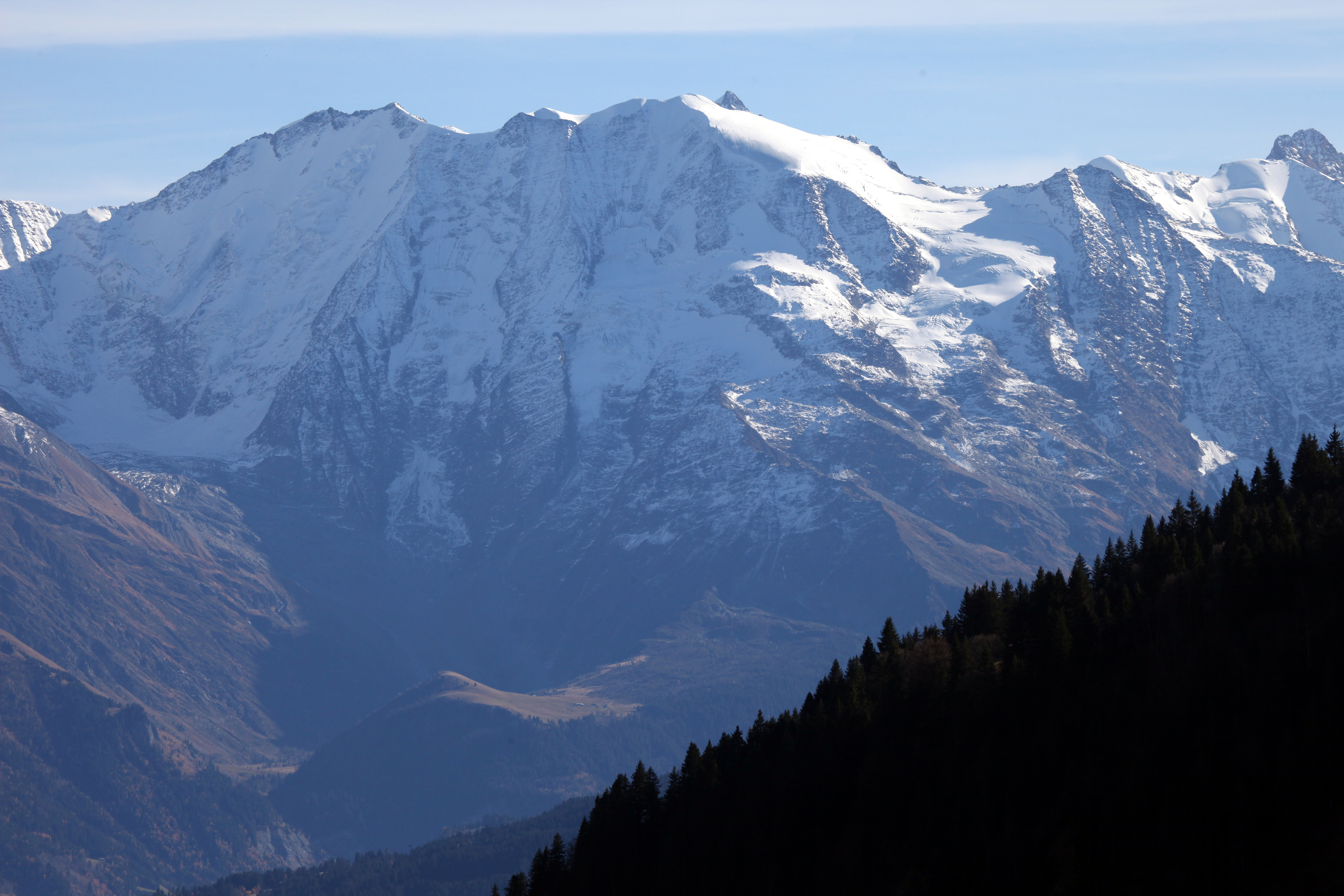 Les Dômes de Miage vus de Mayères.